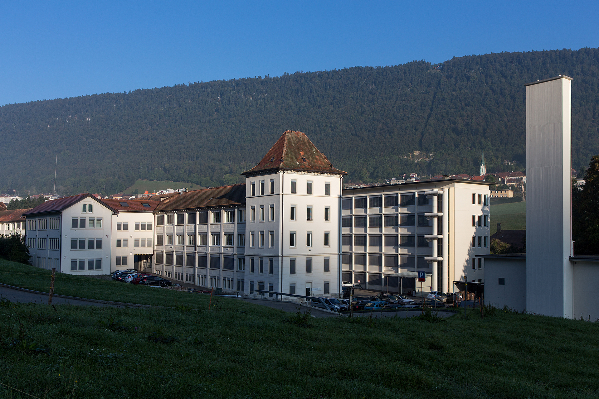 Gebäudekomplex von Longines (Hersteller von Zeitmessern) in Saint-Imier